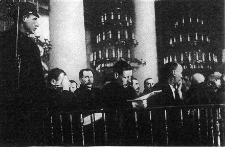 Обвиняемые Второго Московского процесса в ходе заседания суда (январь 1937)